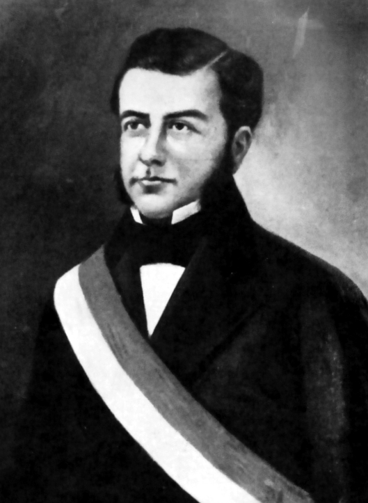 Manuel Tellería Vicuña, (1789 - 1839) Político peruano. Presidente interino o Encargado del mando en 1832.